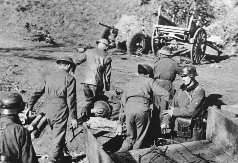 Italien, Nettuno, britische Kriegsgefangene, Verwundete Bei Nettuno gefangengenommen Mühselig, noch erschüttert vom Grauen der schweren Schlacht, bringen die von den Deutschen gefangenen Anglo-Amerikaner ihre verwundeten Kameraden zum ersten Verbandsplatz der deutschen Fallschirmjäger, wo sie sofortige ärztliche Betreuung finden. Der Kampf der Anglo-Amerikaner in Italien ist nicht nur ein Schneckenkrieg, sondern auch mit gewaltigen blutigen Verlusten für den angreifenden Feind verbunden. PK Aufnahme Kriegsbericher Groß 6.3.44 [Herausgabedatum] (00809-44)